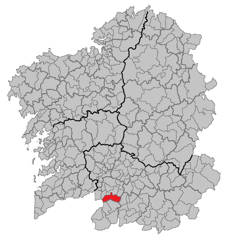 Mapa coa localización do concello de Verea.